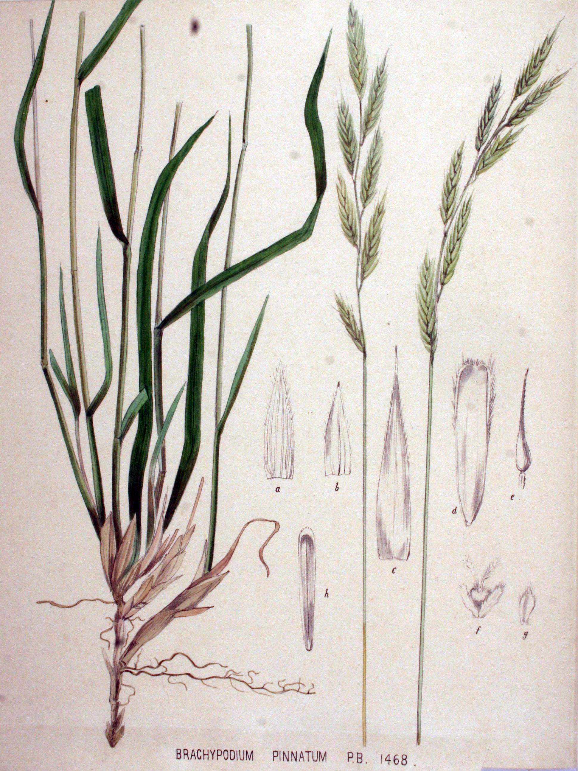 Brachypodium pinnatum (L.) Beauv.